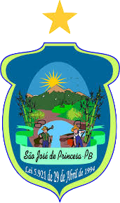 Brasão do município de São José de Princesa na Paraíba